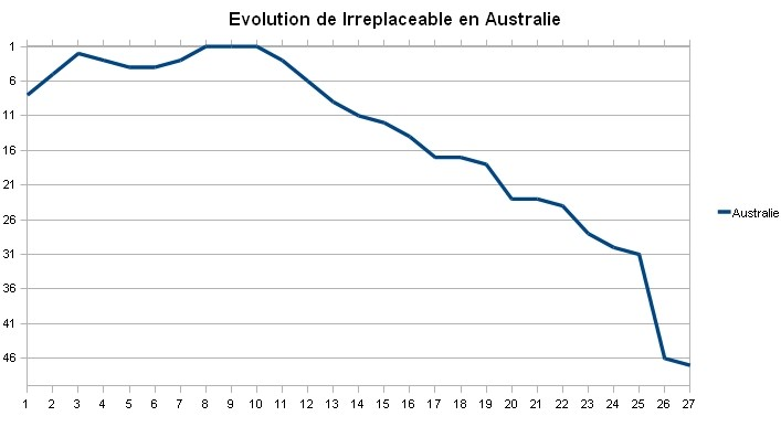 Evolution du classement de la chanson Irreplaceable de Beyoncé Knowles en Australie.